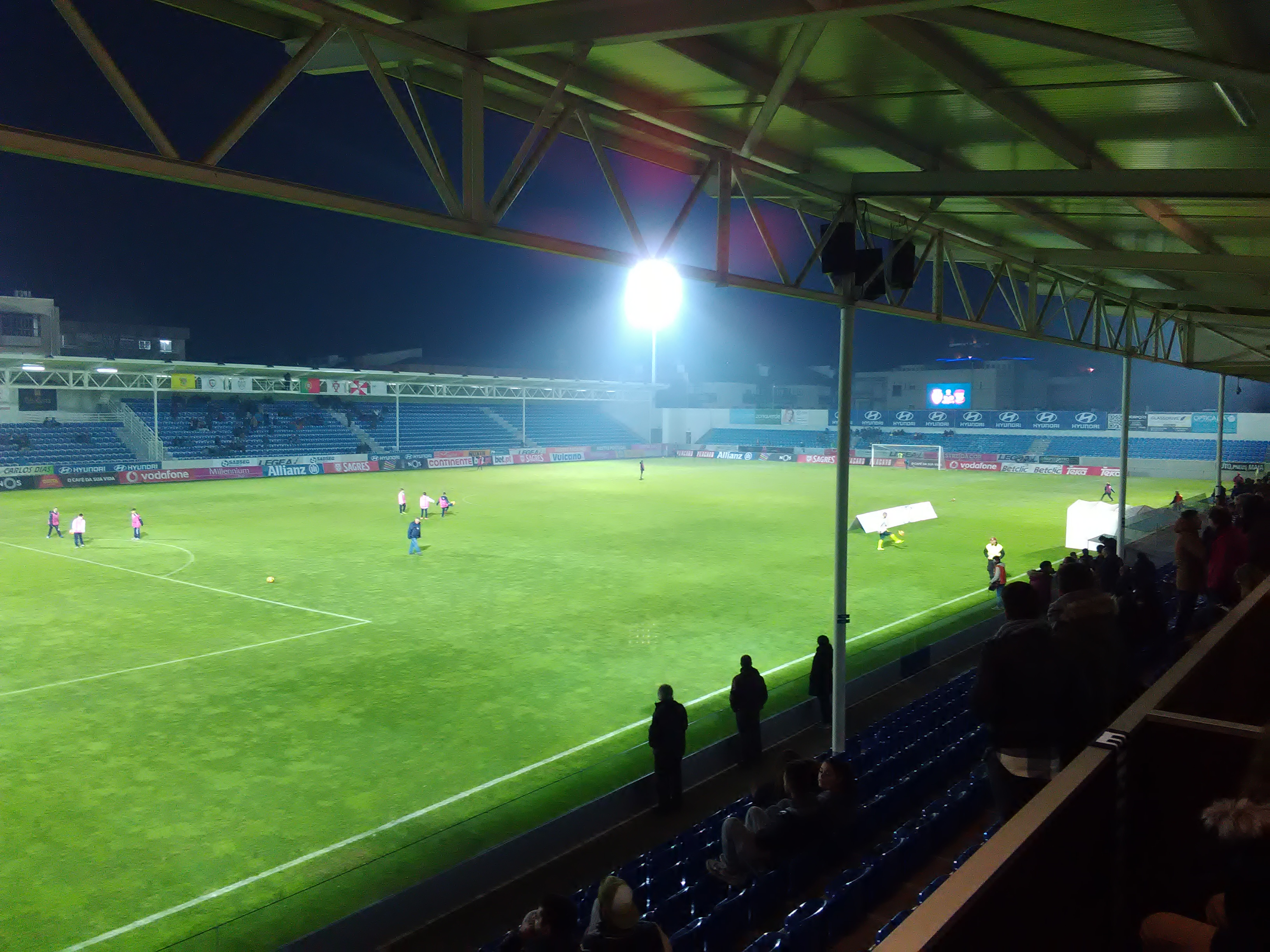 Estádio Marcolino de Castro, casa do Clube Desportivo Feirense